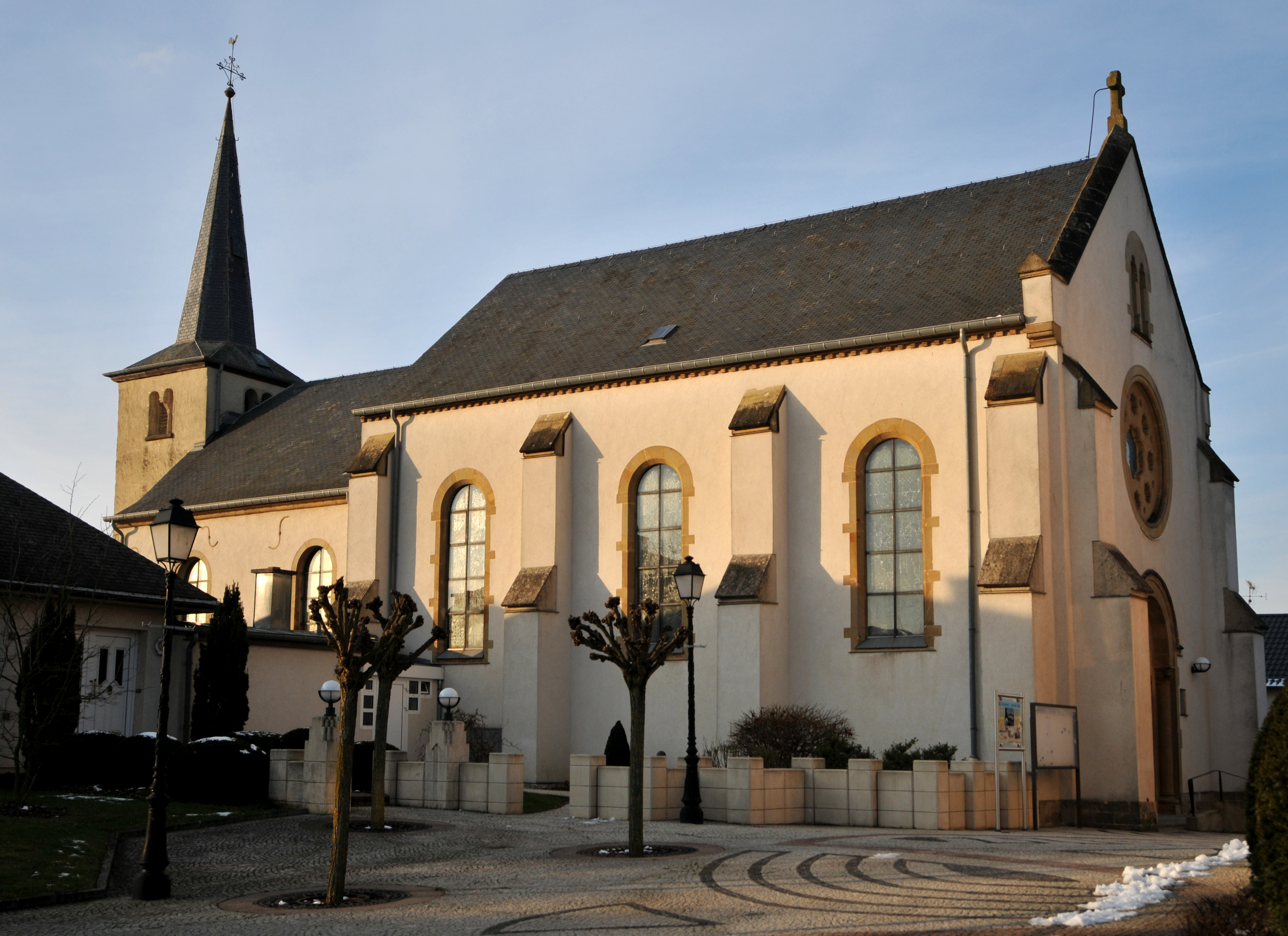 D'Jousefskierch zu Alzeng.